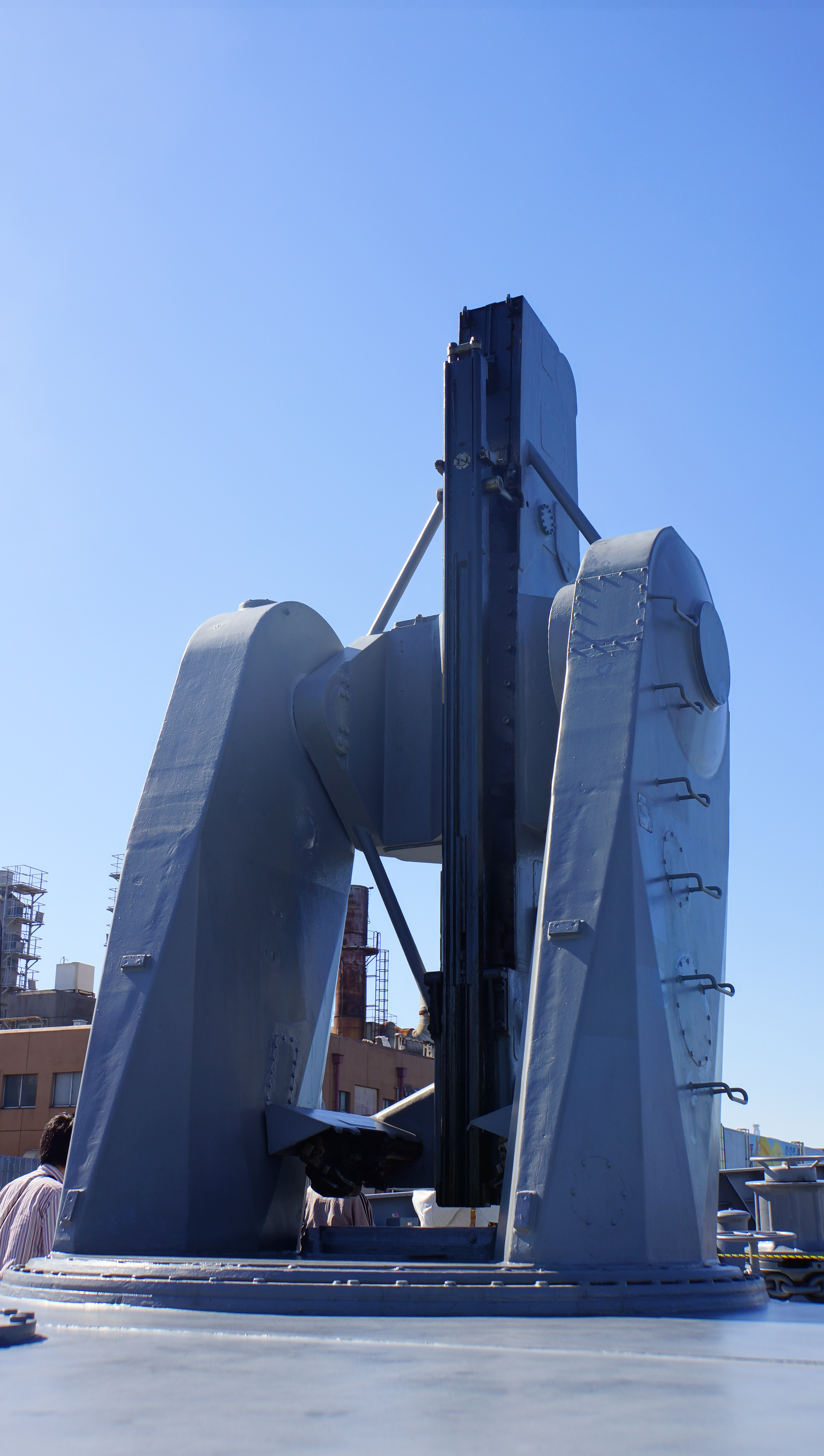 海上自衛隊 ミサイル護衛艦はたかぜ（DDG-171） Mk.13 mod4ミサイル単装発射機。 14年10月19日 堺泉北港にて。